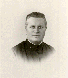 Raile Jakab|Raile Jakab (Vaskút, 1894 – Newark, New Jersey állam, 1949) jezsuita páter.